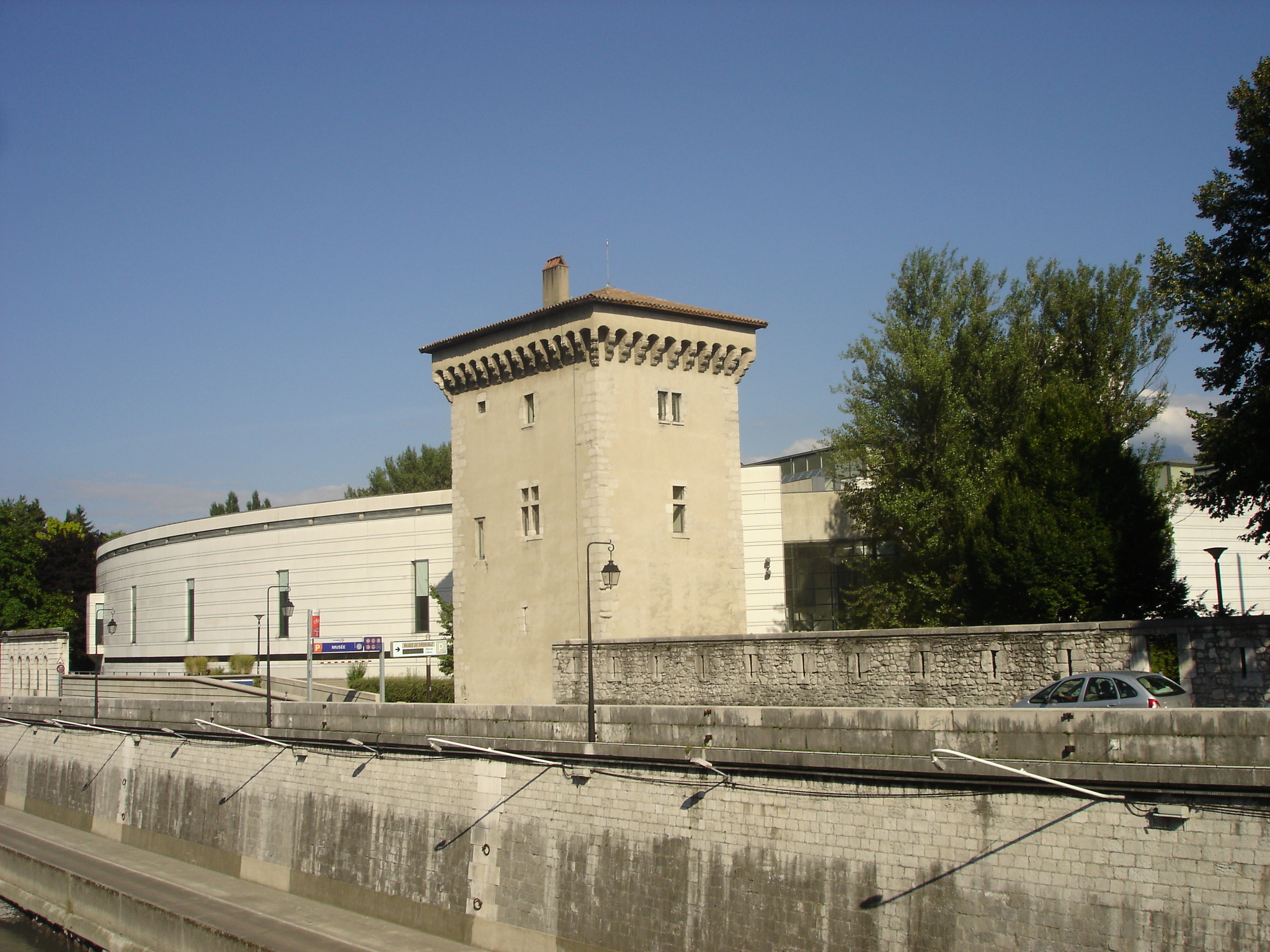 La tour de Lisle sur les quais de l'Isère avec derrière le musée de Grenoble.